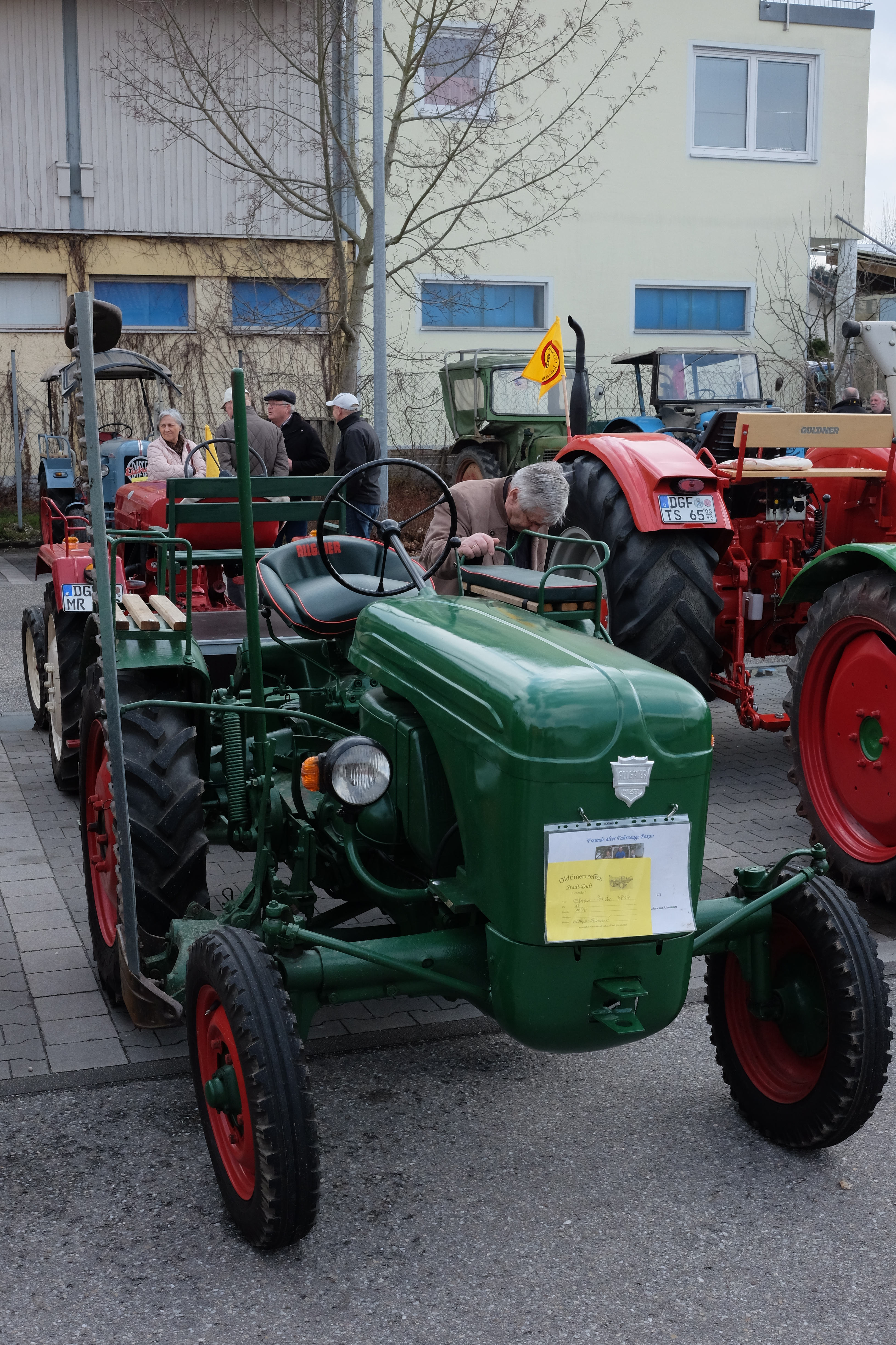 Baujahr 1952, 15PS Porsche AP 17